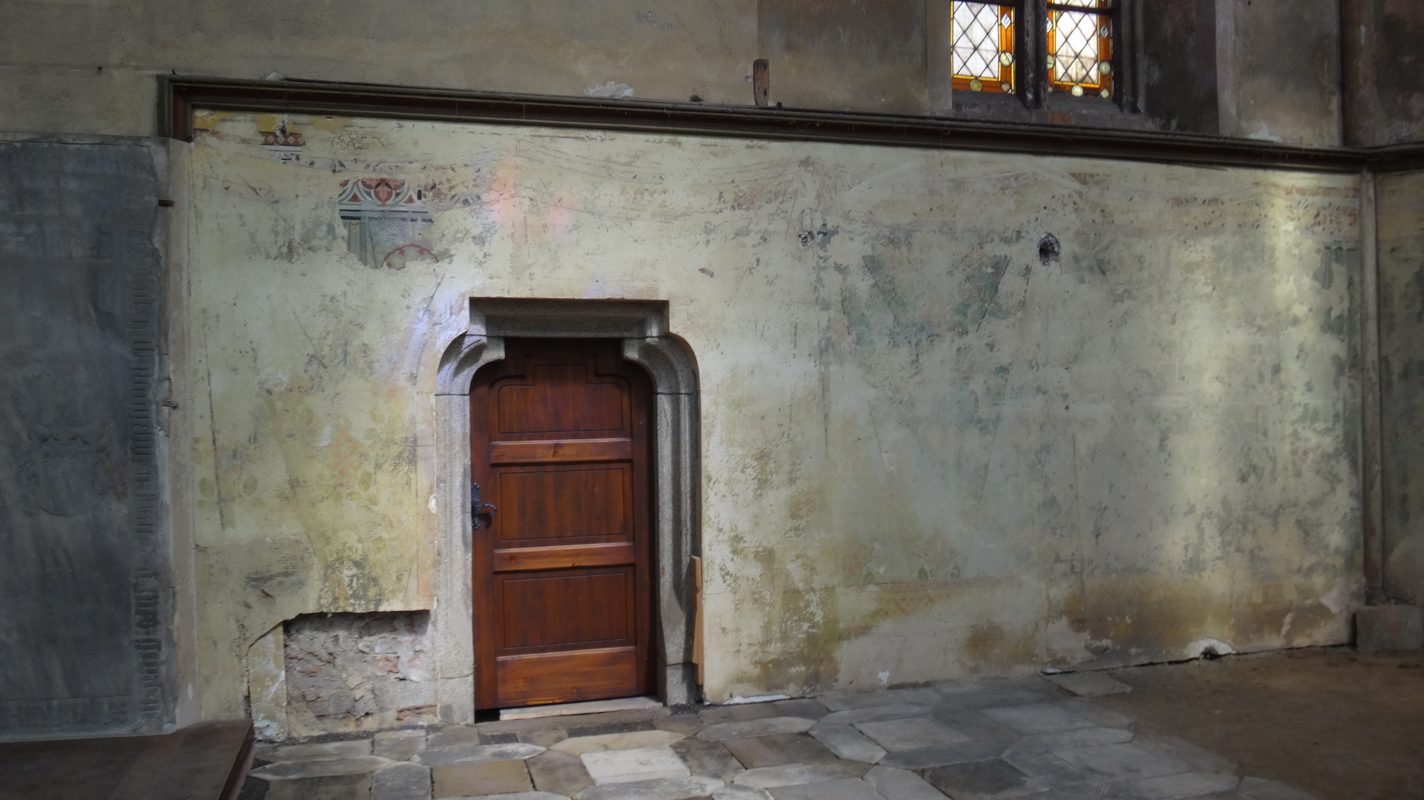 pozdně gotické dveře